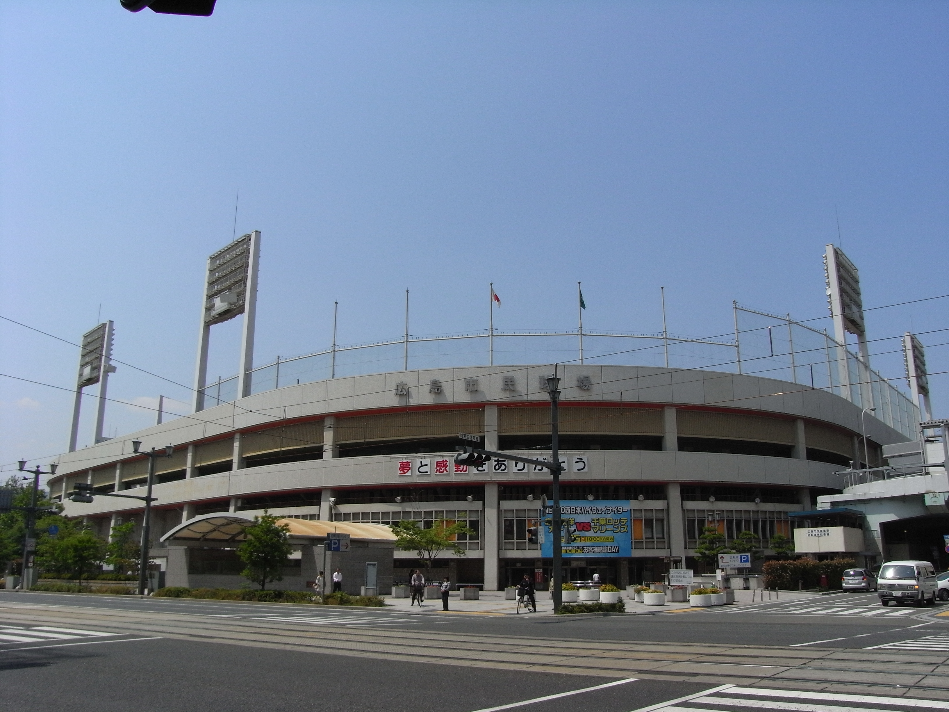 Hiroshima Municipal Baseball Stadium(広島市民球場